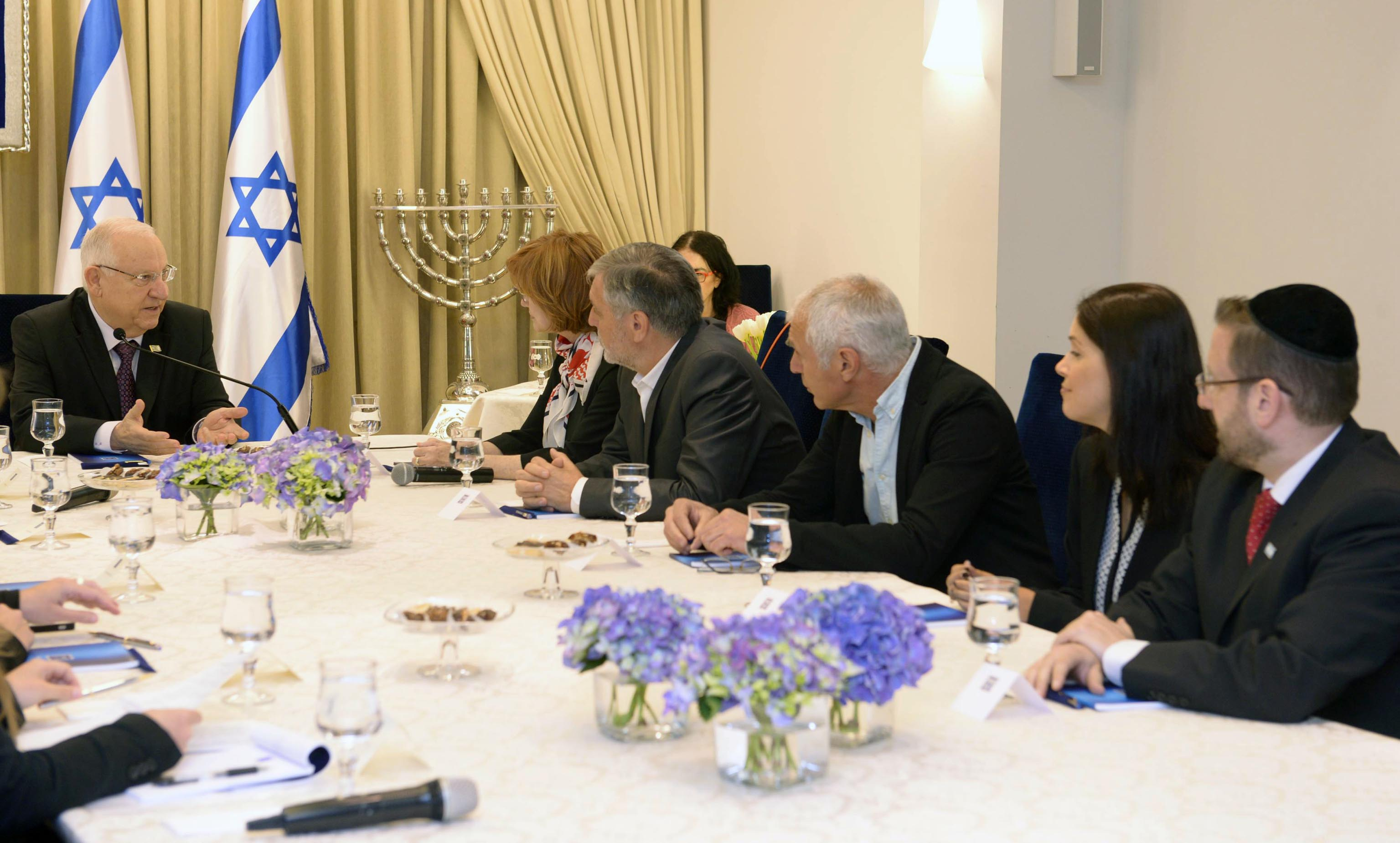 נשיא מדינת ישראל ראובן ריבלין פותח בהתייעצויות עם המפלגות השונות לקראת הרכבת הממשלה לאחר בחירות מרץ 2015 עם יש עתיד